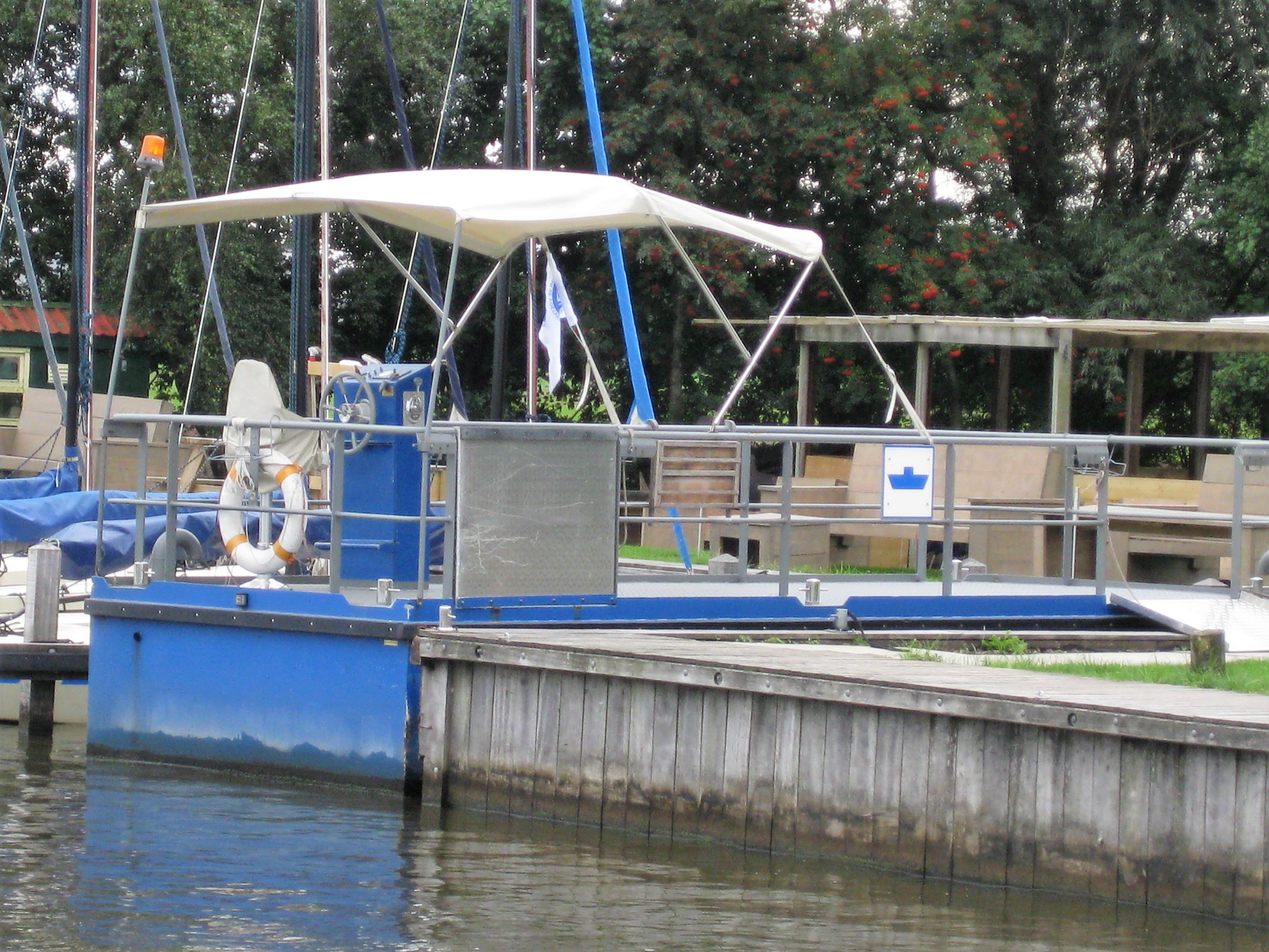 Fietspont vanuit Swettepoel bij Broek over de Noorder Oude Weg in Friesland